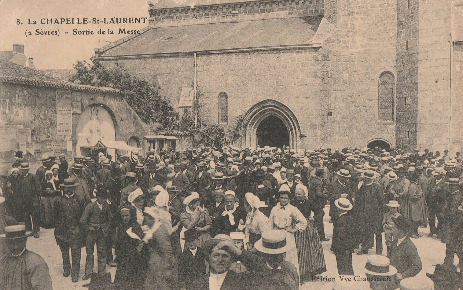 Sortie de messe à La Chapelle-Saint-Laurent vers 1905.